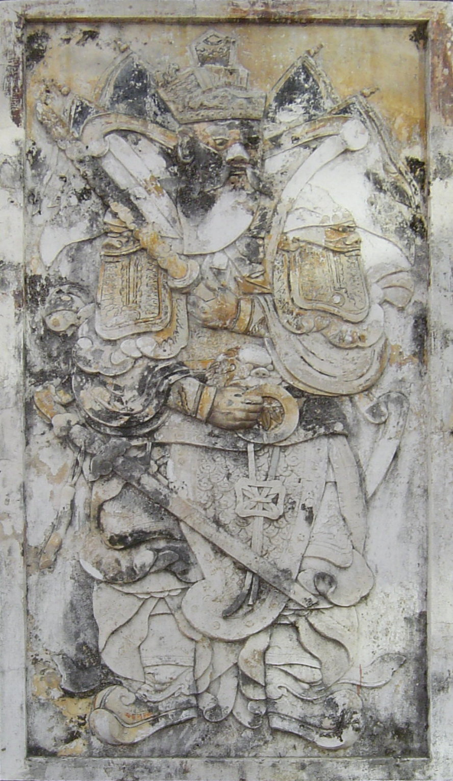 中文（台灣）: 高雄市左營區鳳山縣舊城北門外壁門洞右側門神．鬱壘。